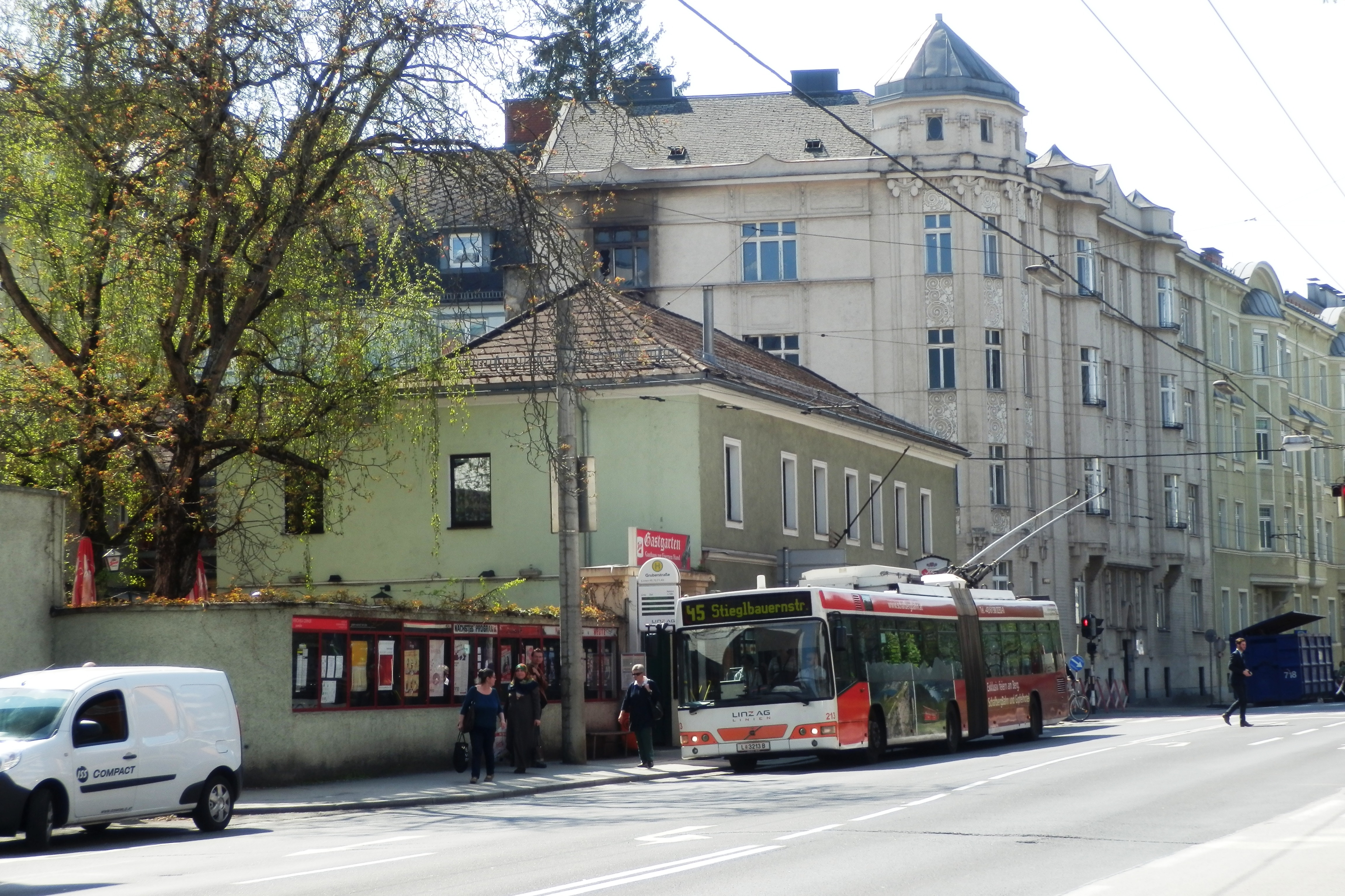 Linz AG Obus - Linie 45 in der Weißenwolffstraße, Haltestelle Gruberstraße, vor dem Theater und Gasthaus Eisenhand